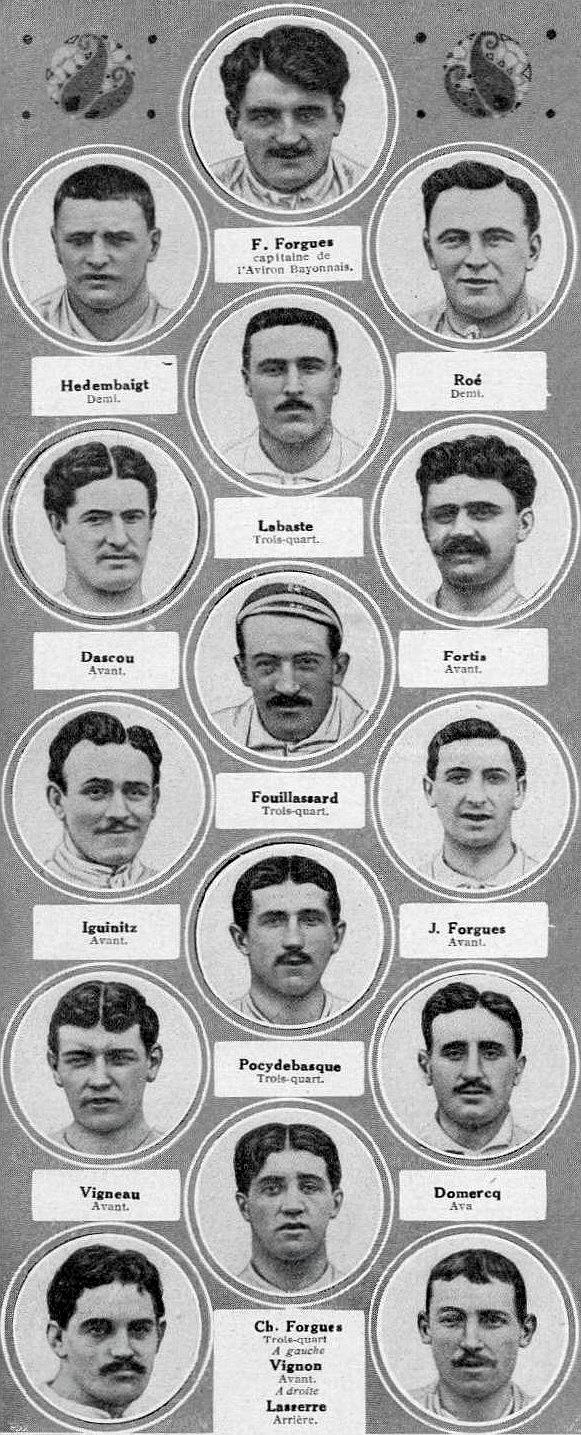 L'Aviron bayonnais, champion de France de rugby en avril 1913.